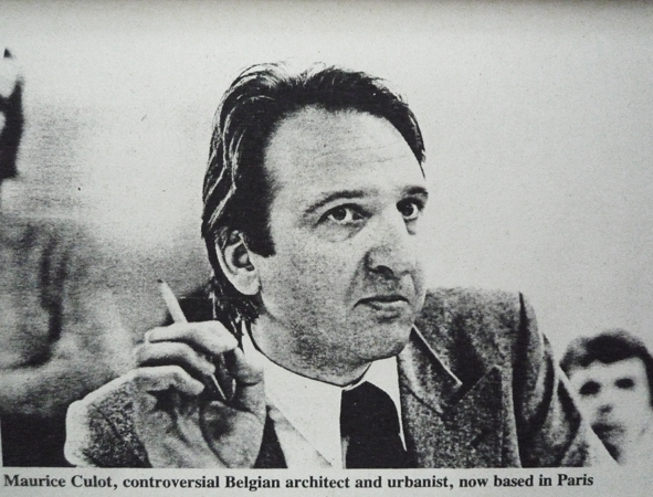 Maurice Culot, controversial architect, now based in Paris, 1980.